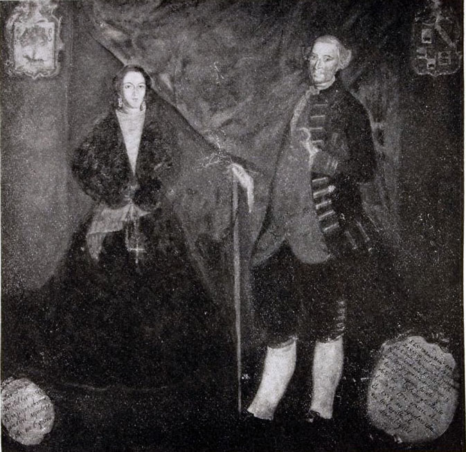 Retrato de Doña Carmen Errázuriz Madariaga y el Corregidor Luis Manuel de Zañartu.